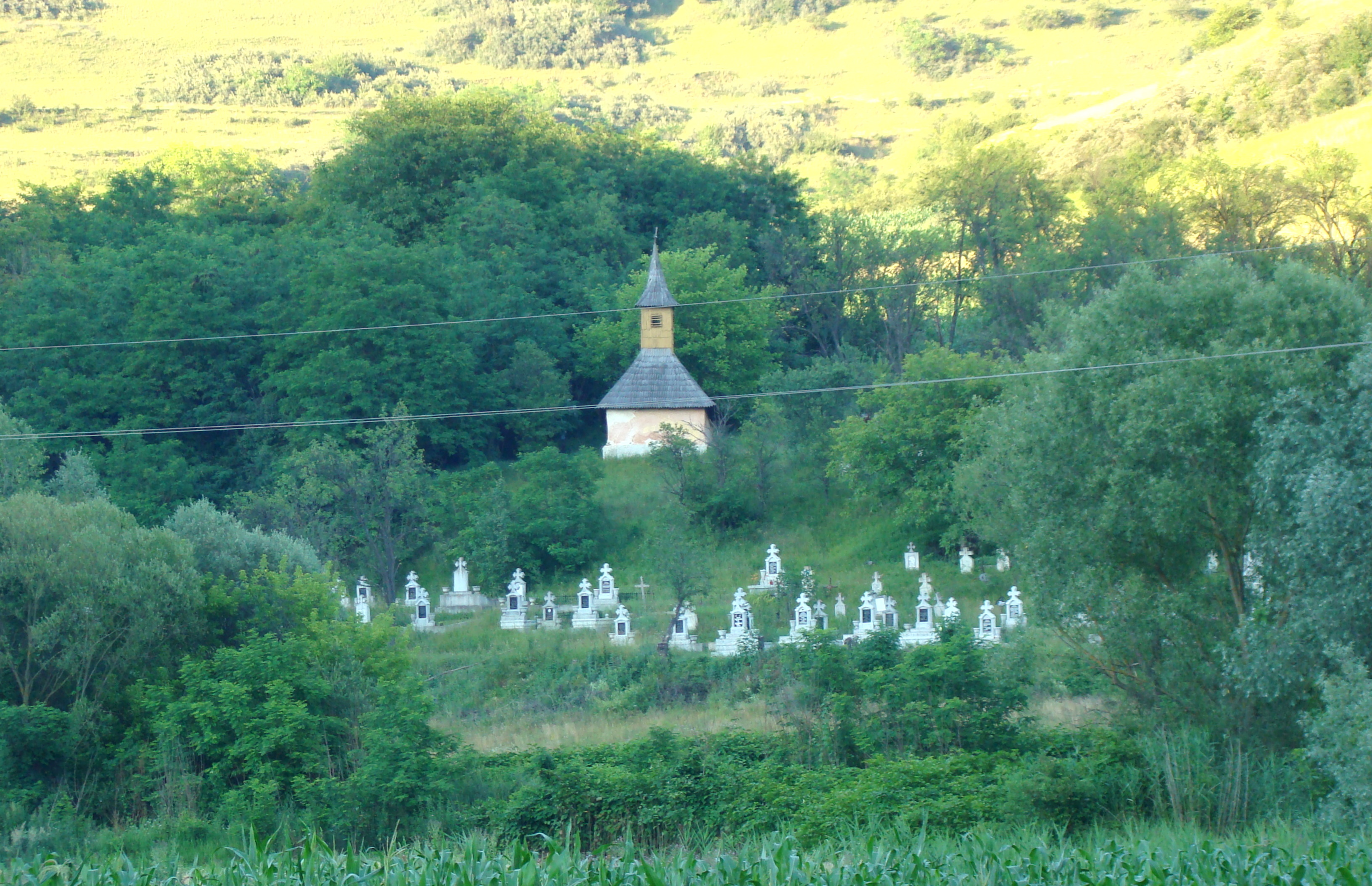 Biserica de lemn „Sfinții Arhangheli Mihail și Gavriil” din Târgușor, comuna Sânmartin, județul Cluj